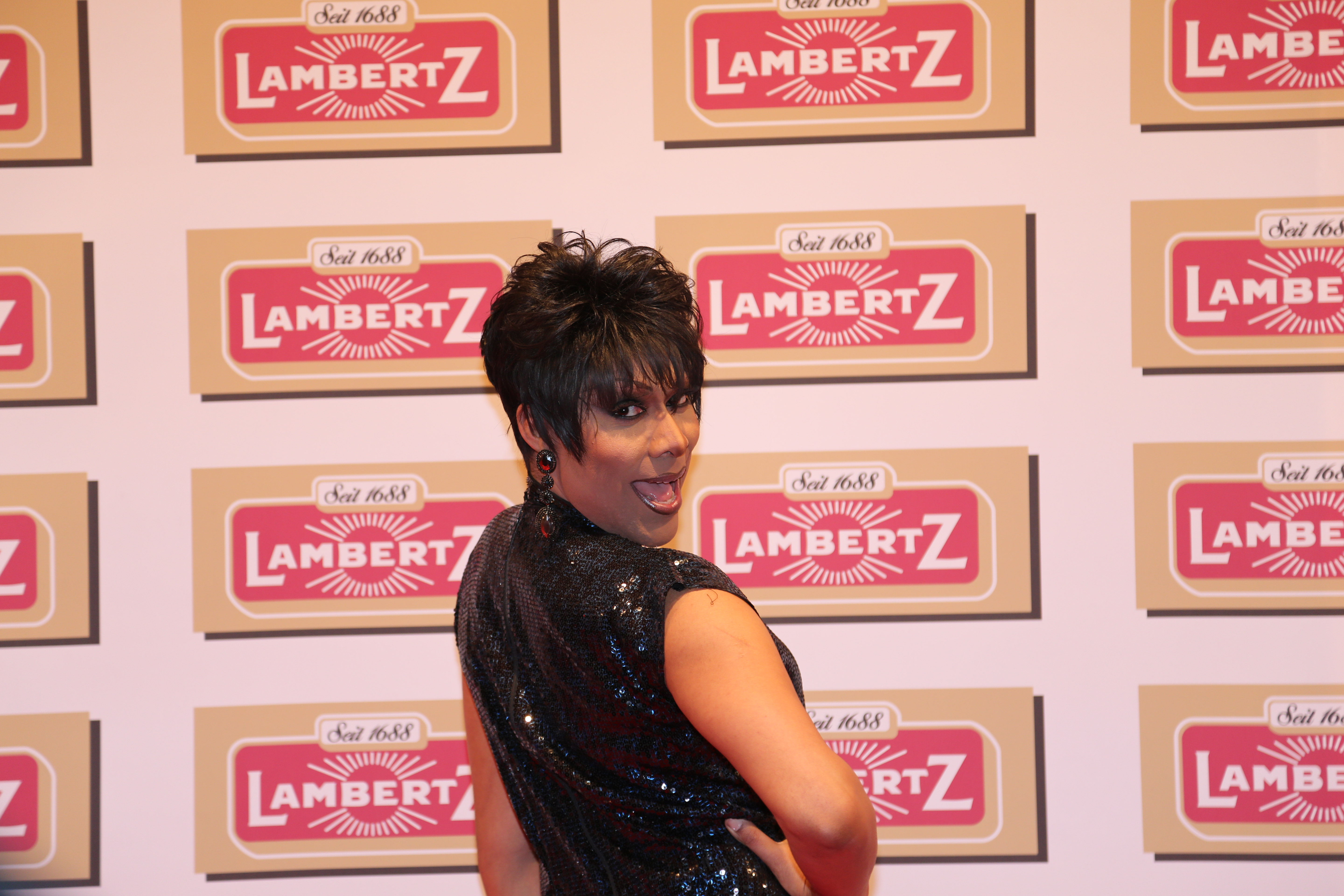 Catherrine Leclery bei der Lambertz Monday Night 2017.